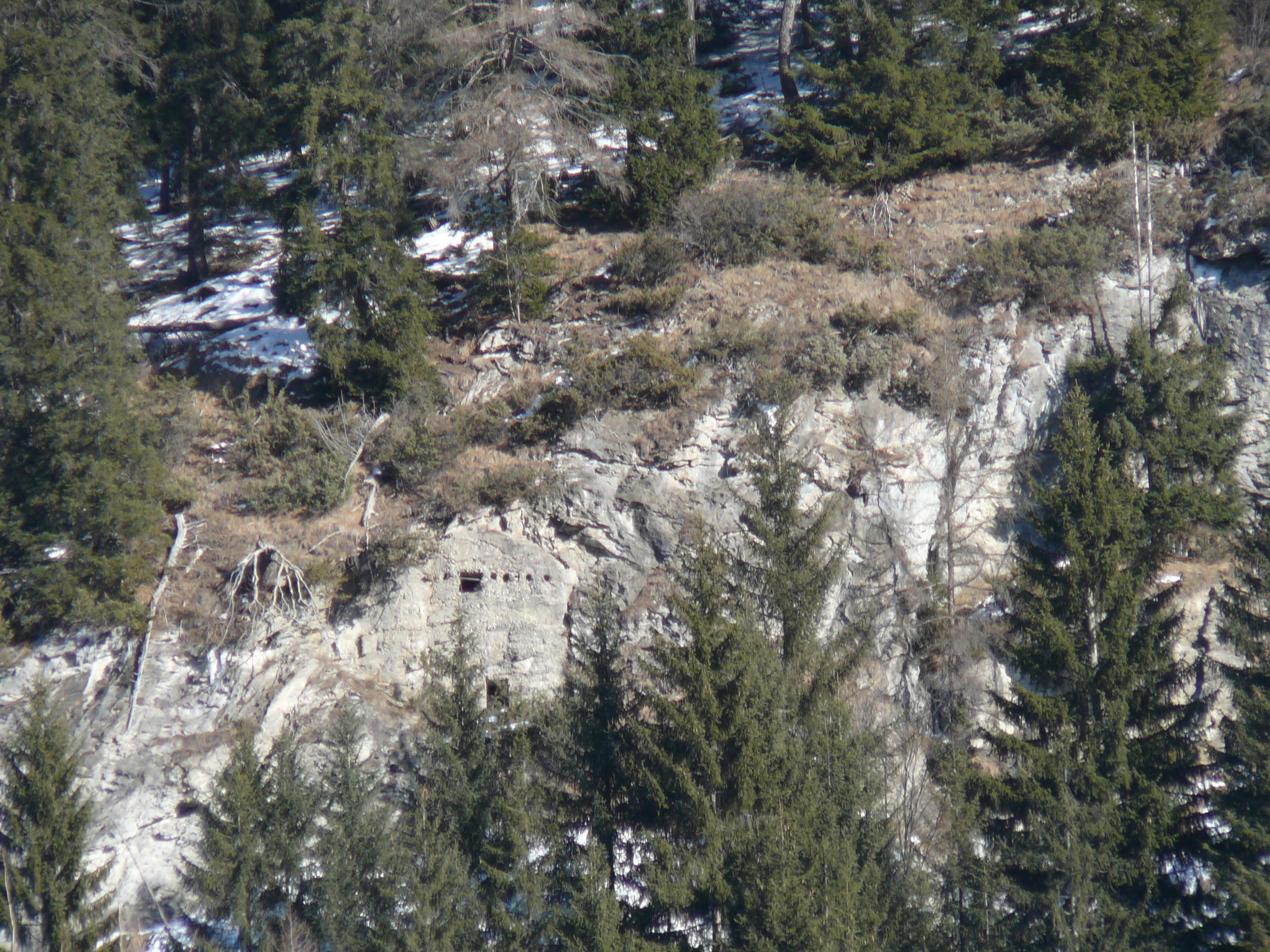 Opera 1 bis, Tenne-Novale